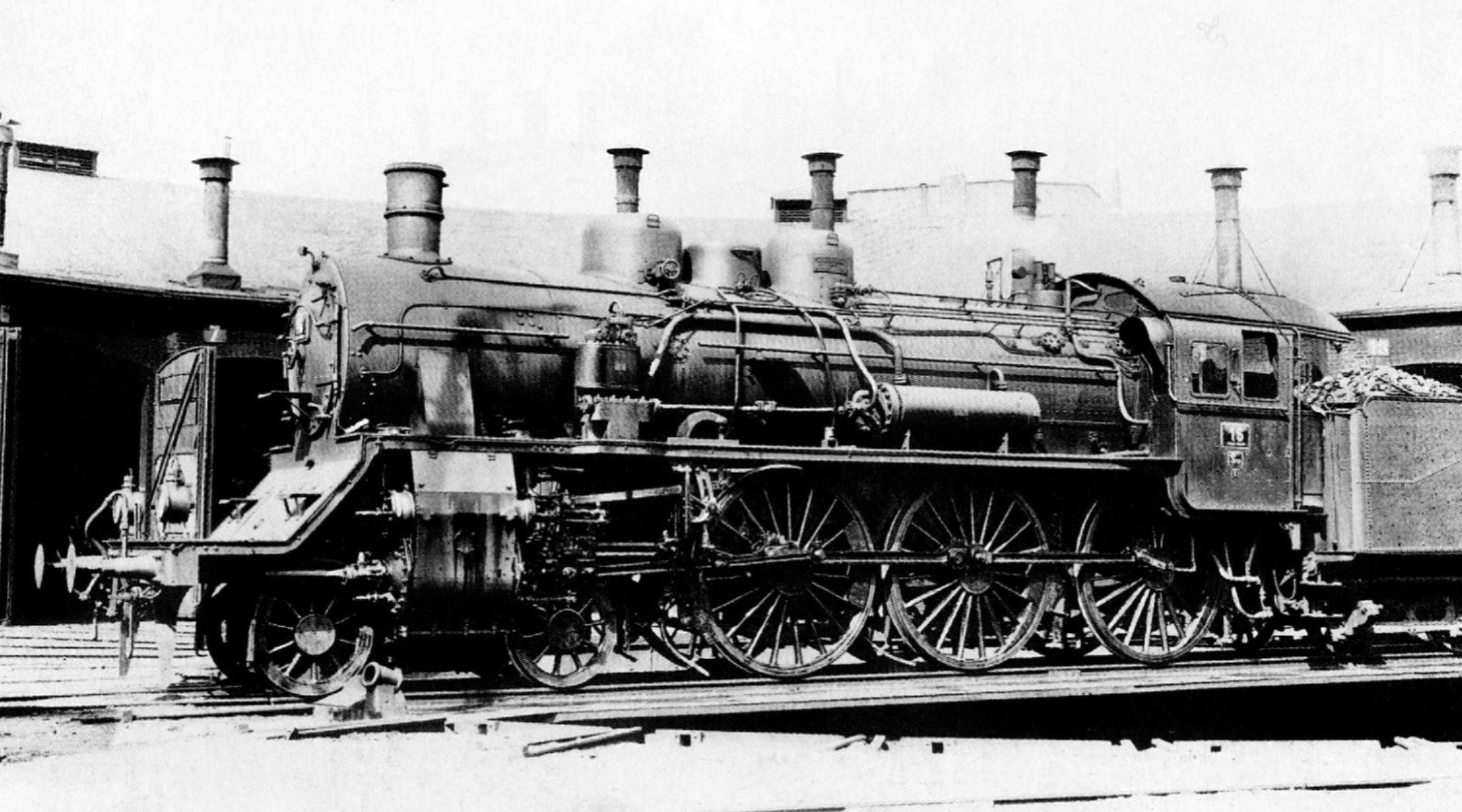 Damplokomotive der Bauart S 10 der Lübeck-Büchener Eisenbahn, Nr. 16 (spätere 17 303)